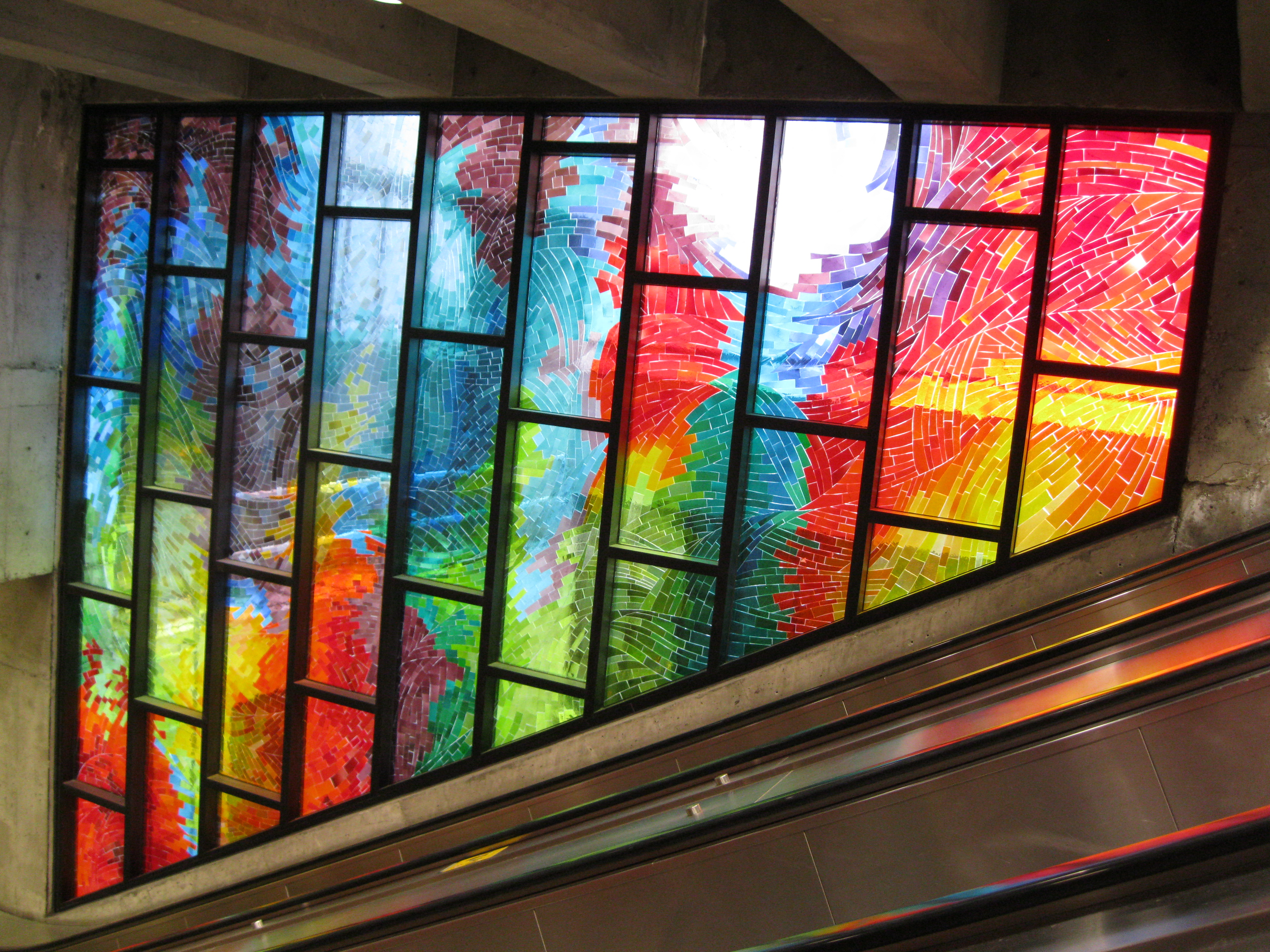 Vitrail de la station de métro Charlevoix, Montréal